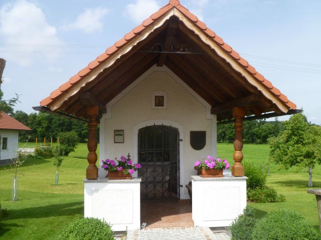 Schloss_Wimhub-Schlosskapelle